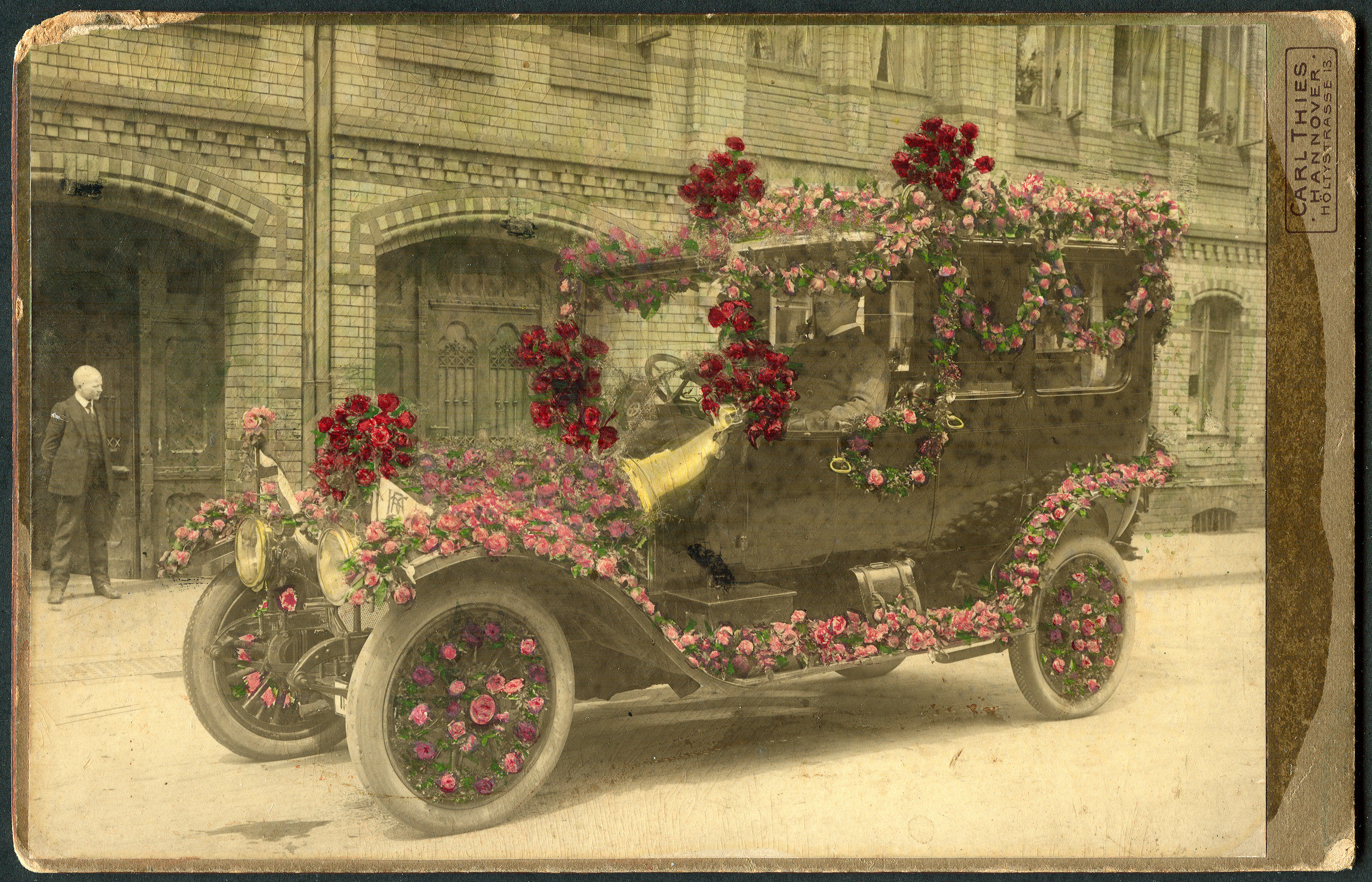 Handkolorierte und lackierte Fotografe im Kabinettfotografie des Fotografen Carl Thies: Blumengeschmücktes Kraftfahrzeug mit dem Wimpel des Hannoverschen Automobil Clubs, hinter dem Steuer der Chauffeur, im Hintergrund ein scheinbar den Fotografen nicht bemerkender kahlgeschorener junger Mann. Laut dem auf dem Revers handschriftlich mit Bleistift hinzugefügten Datum wurde das Foto am 20. Juni 1913 aufgenommen, dem Tag der Einweihung des Neuen Rathauses in Anwesenheit des deutschen Kaisers Wilhelm II. ...